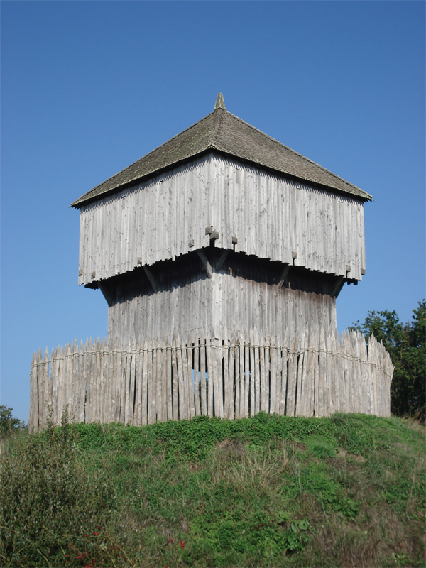 Donjon du château à motte de Saint Sylvain d'Anjou dans le Maine et Loire, France